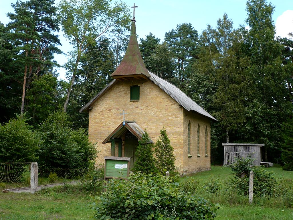 Labraga luterāņu baznīca 2008-08-10